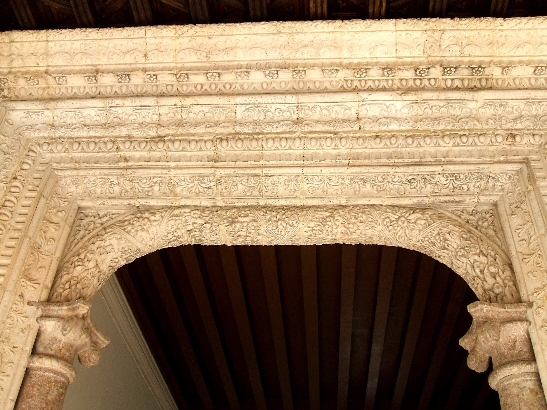 Palacio de los Condes de Miranda, Peñaranda de Duero (Burgos). Detalle del acceso al patio interior. Portada de arco adintelado con intradós carpanel. Profuso trabajo de chambrana plateresca a lo largo de dovelas y las jambas